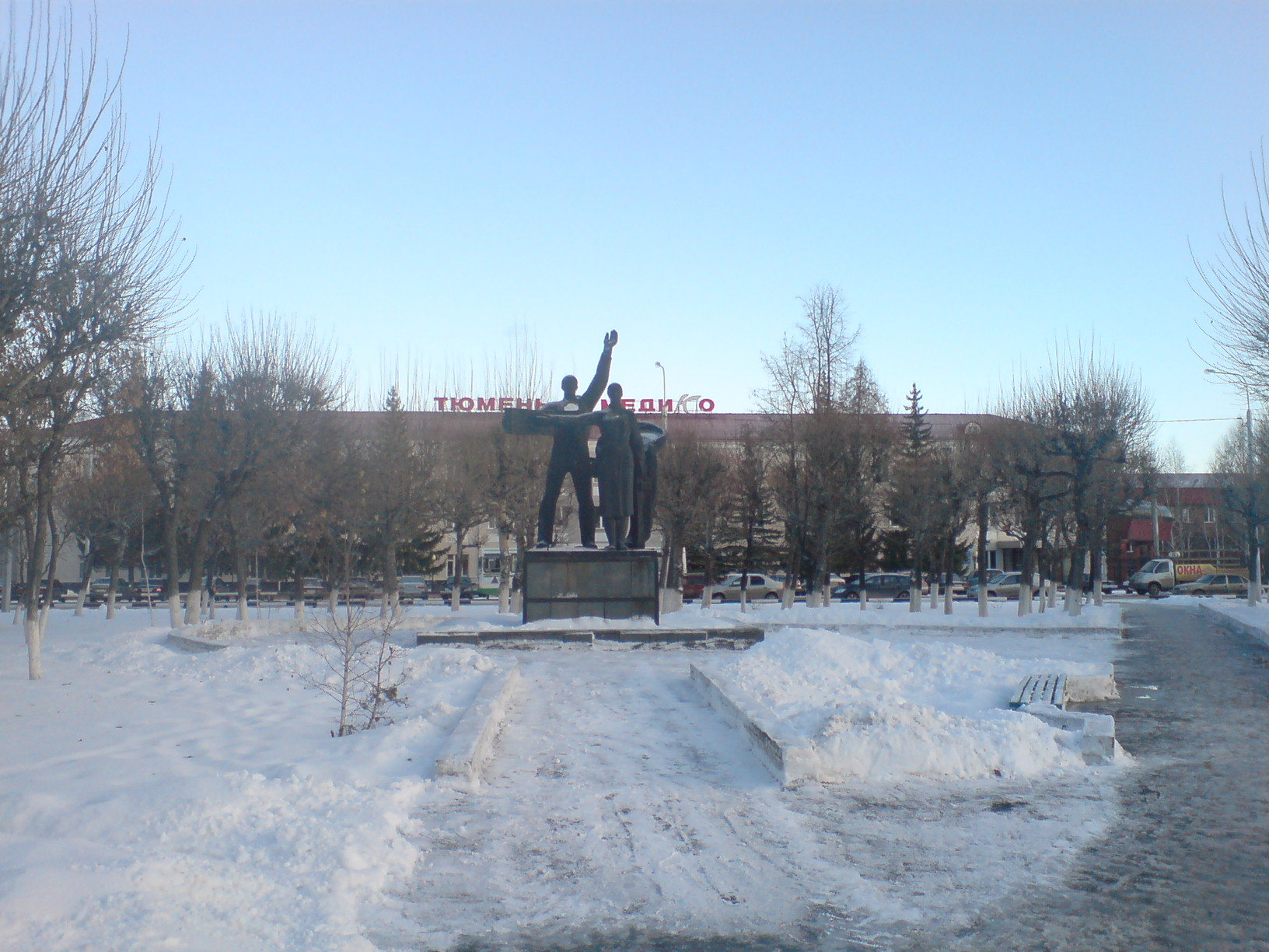 Здание Тюменского завода медоборудования и инструментов (ул. Республики, 205)